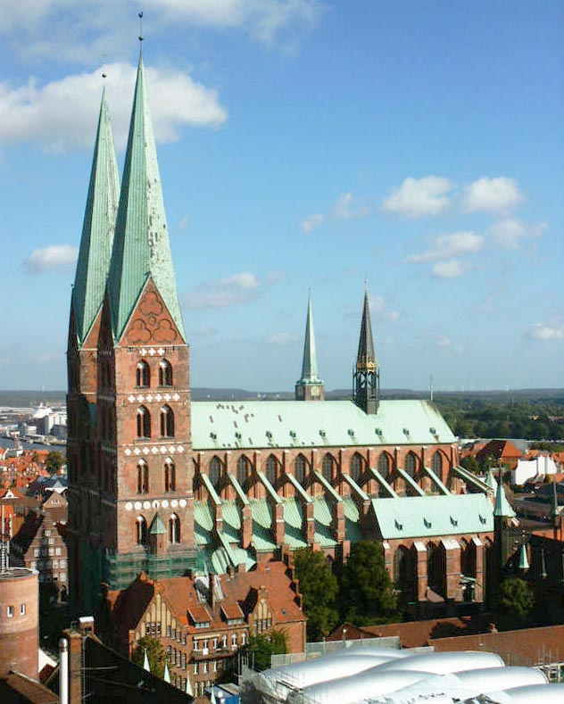 Marienkirche zu Lübeck This is a photograph of an architectural monument. It is on the list of cultural monuments of Lübeck